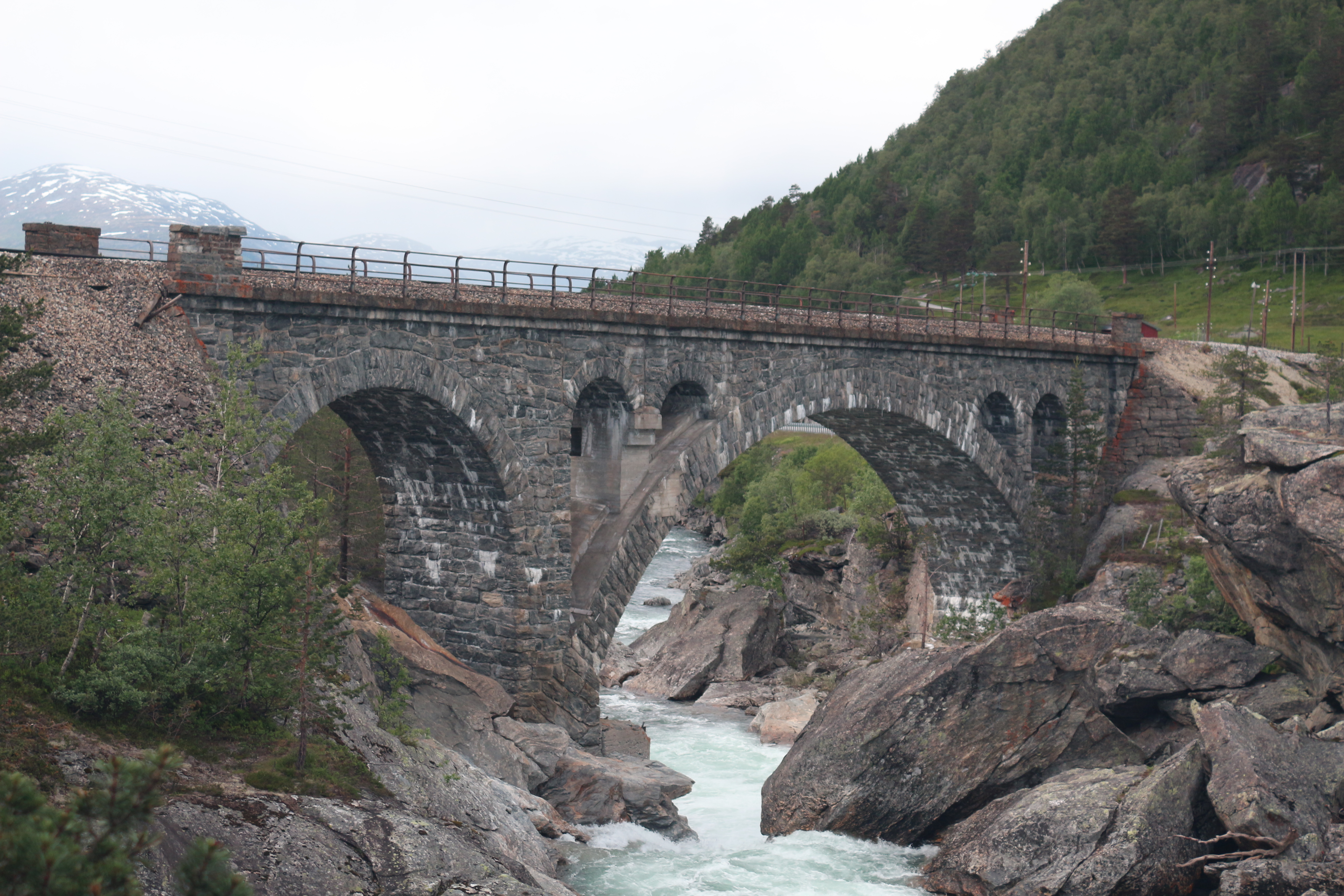 Stuguflåten bru